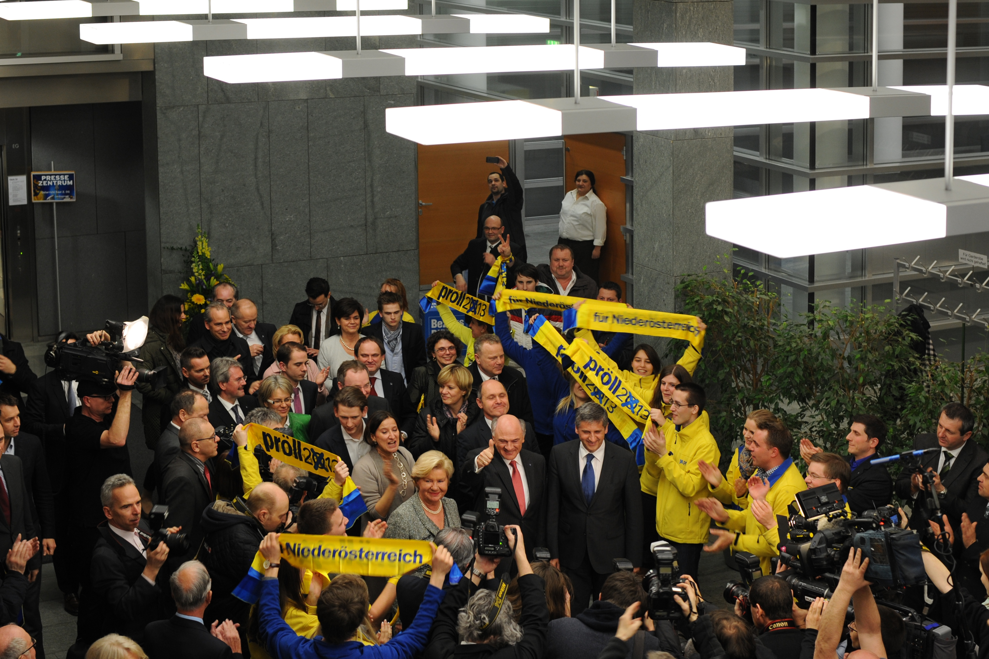 Landtagswahl in Niederösterreich am 3. März 2013: Erwin Pröll nach seiner Wiederwahl.